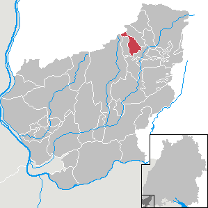 Schönenberg, Landkreis Lörrach, Baden-Württemberg